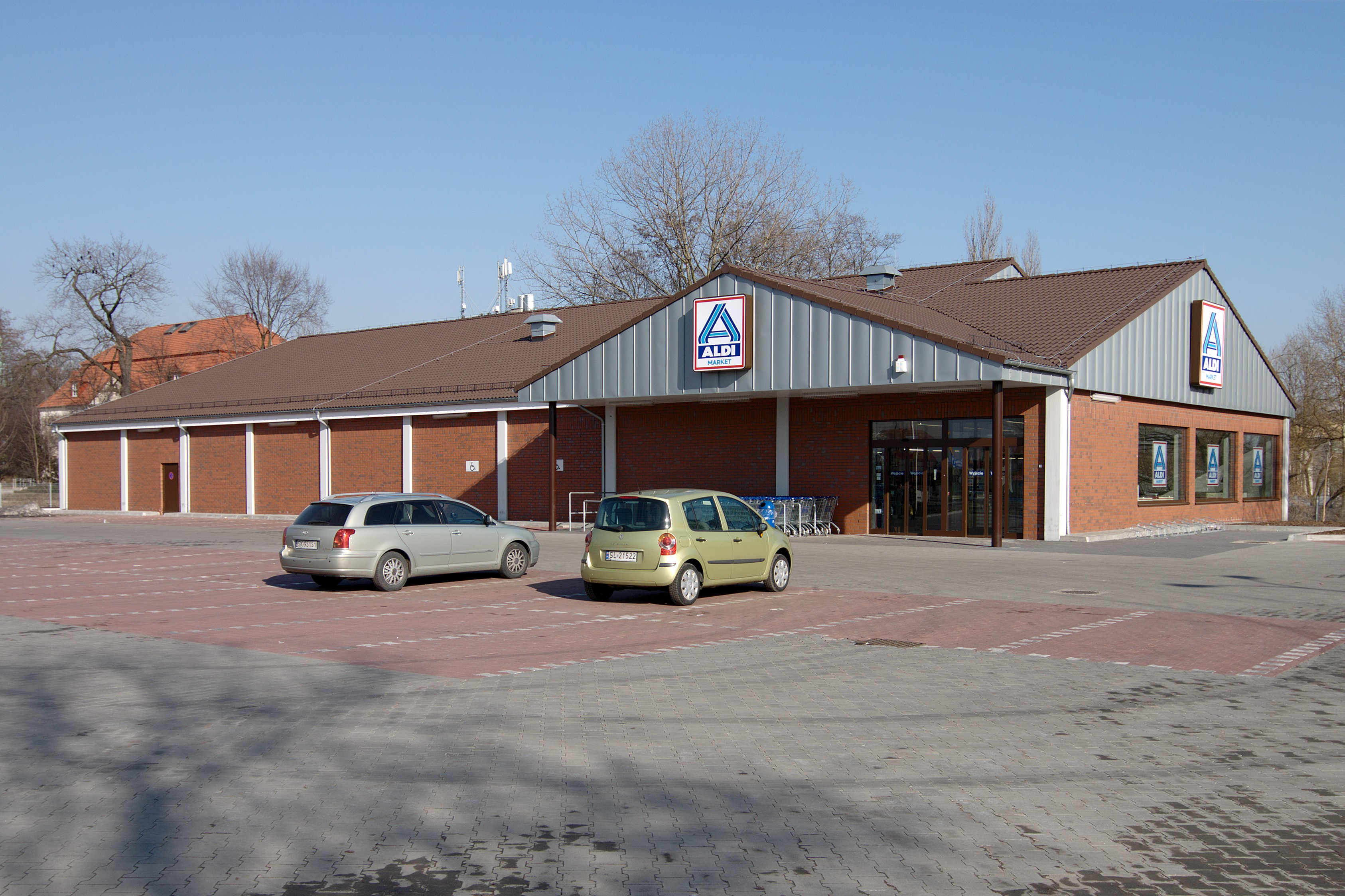 Ruda Śląska. 1 Maja 30. Sklep Aldi.